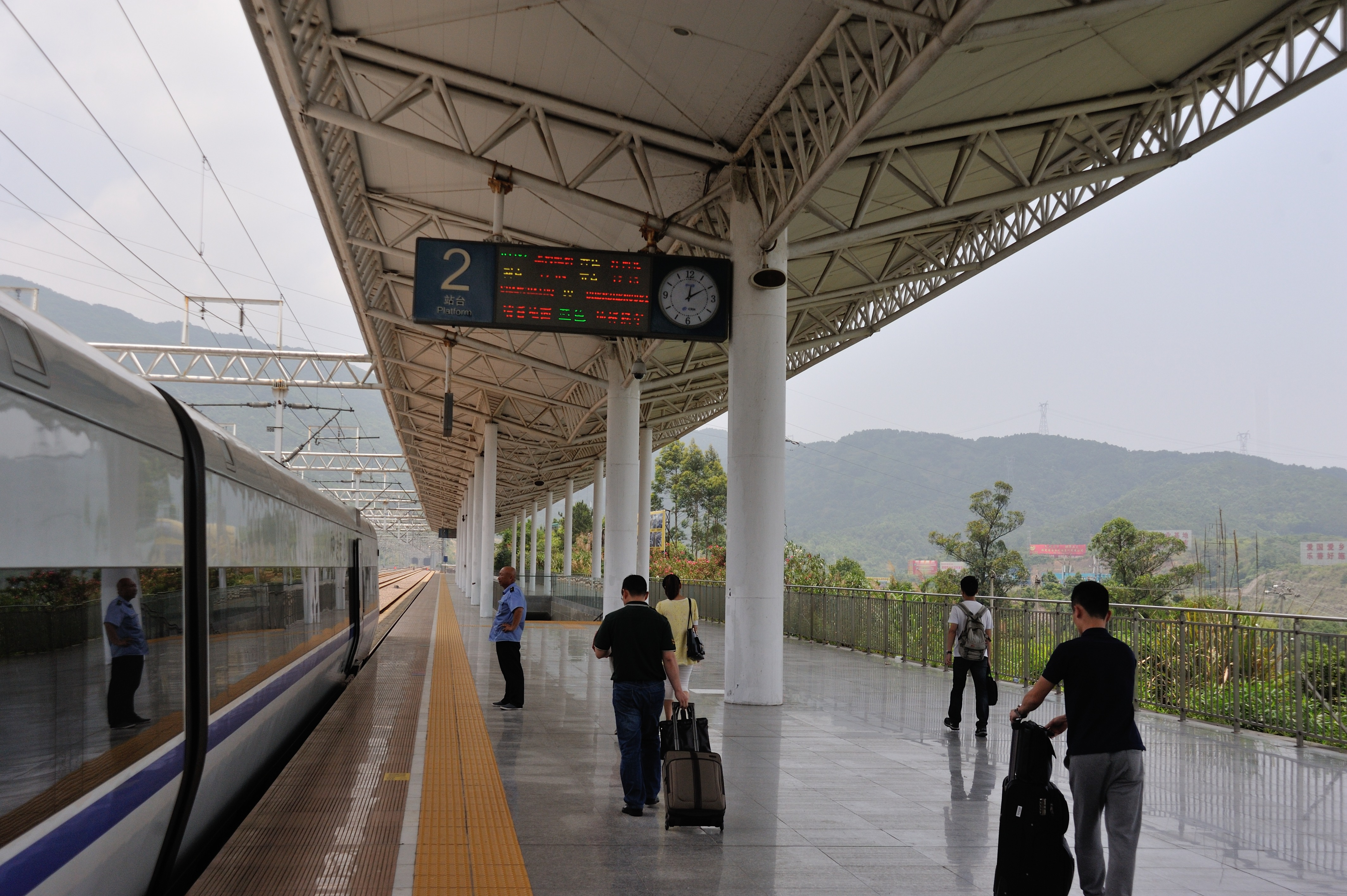 福安站站台